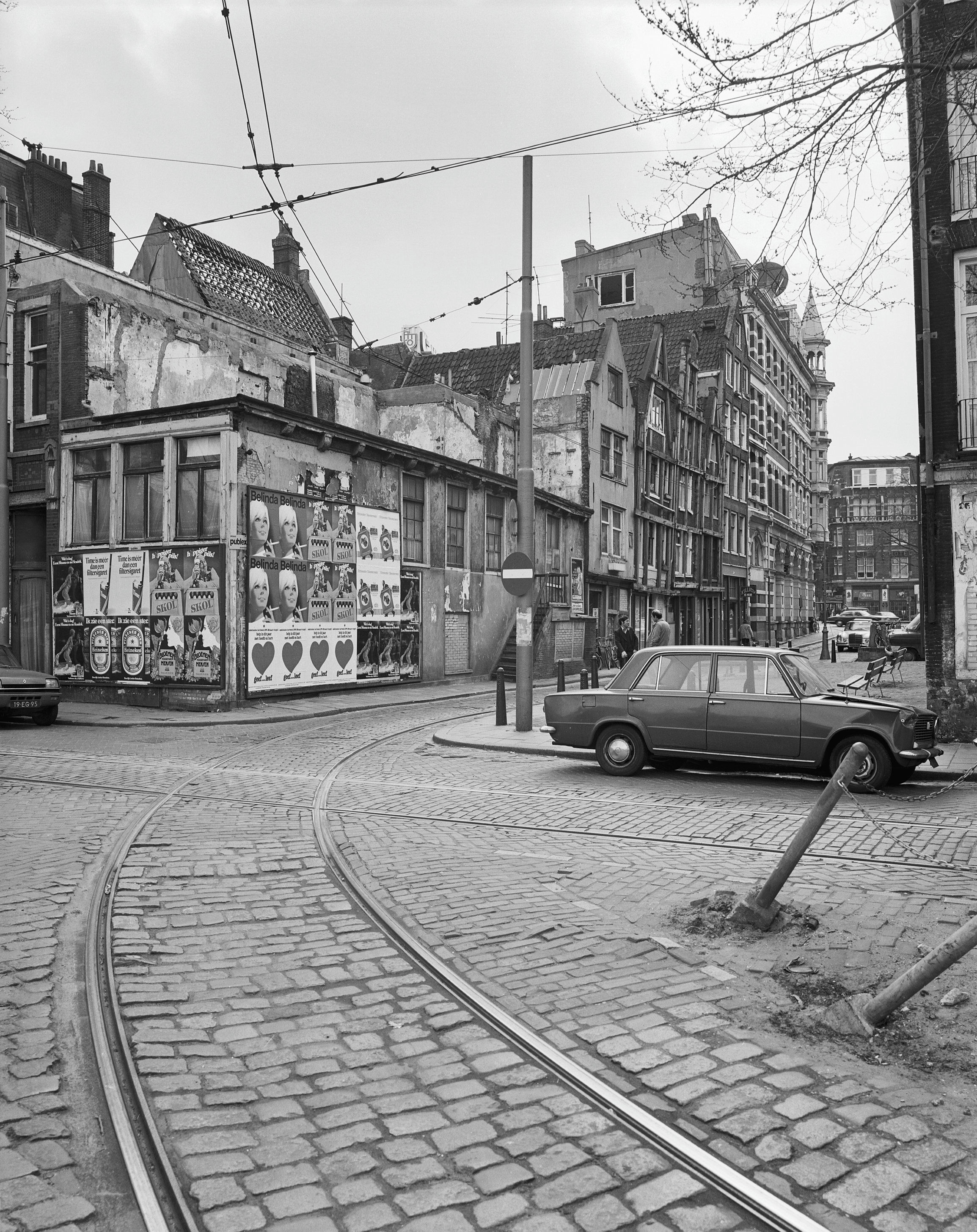 overzicht